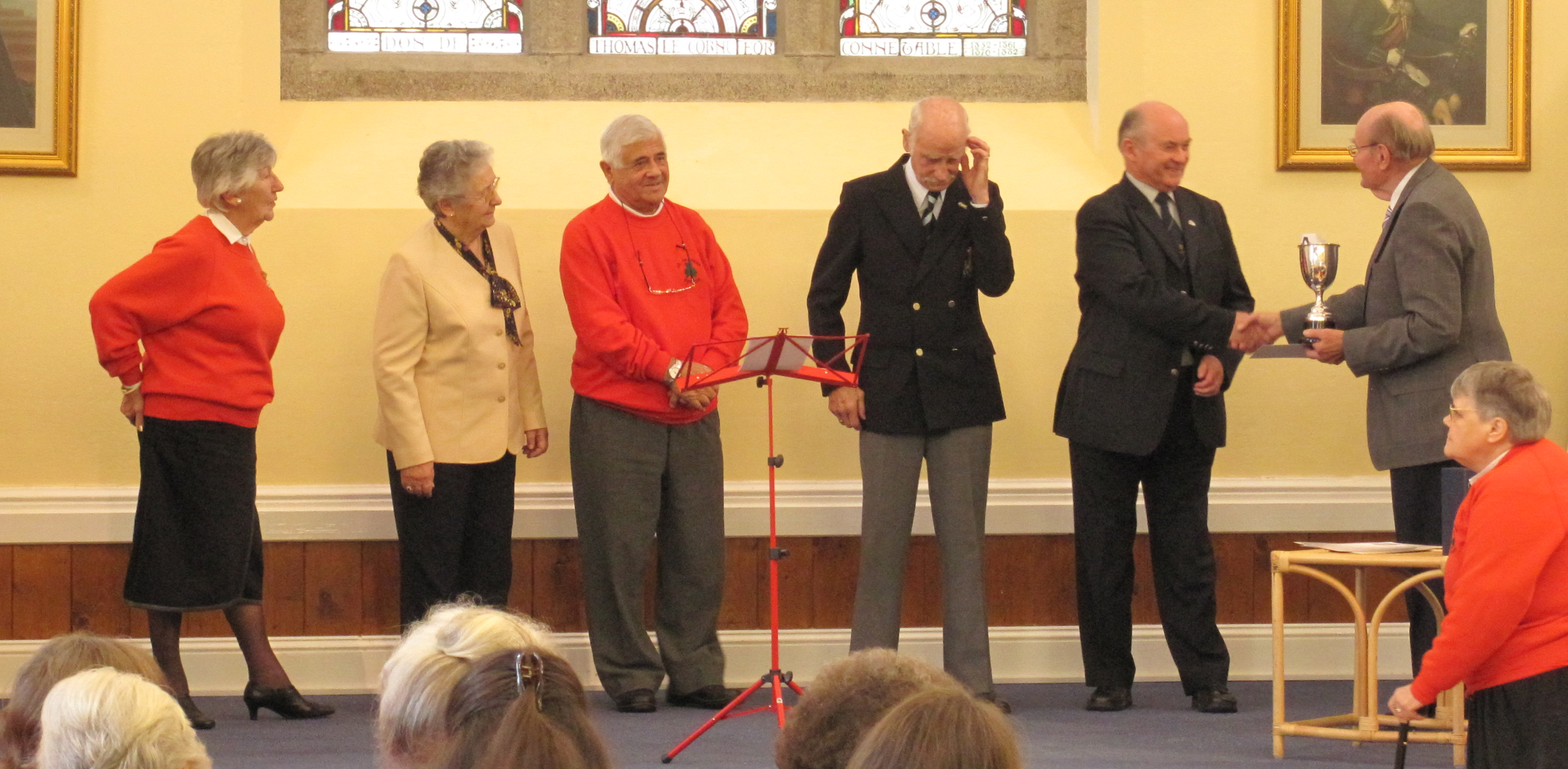 Nrf: Journées Jèrriaises dé l'Eisteddfod dé Jèrri, Novembre 2011